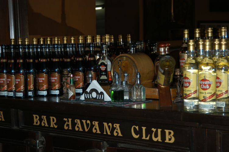 Bar Havana Club, sept 2005, info in de Metadata